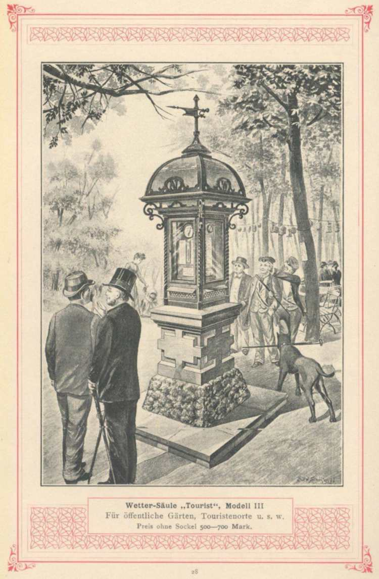 Wettersäule der Firma Wilhelm Lambrecht von 1895, Modell III "Tourist". Die Abbildung stammt aus einem Katalog der Firma Wilhelm Lambrecht. Das Original des Kataloges befindet sich im Stadtarchiv Krefeld